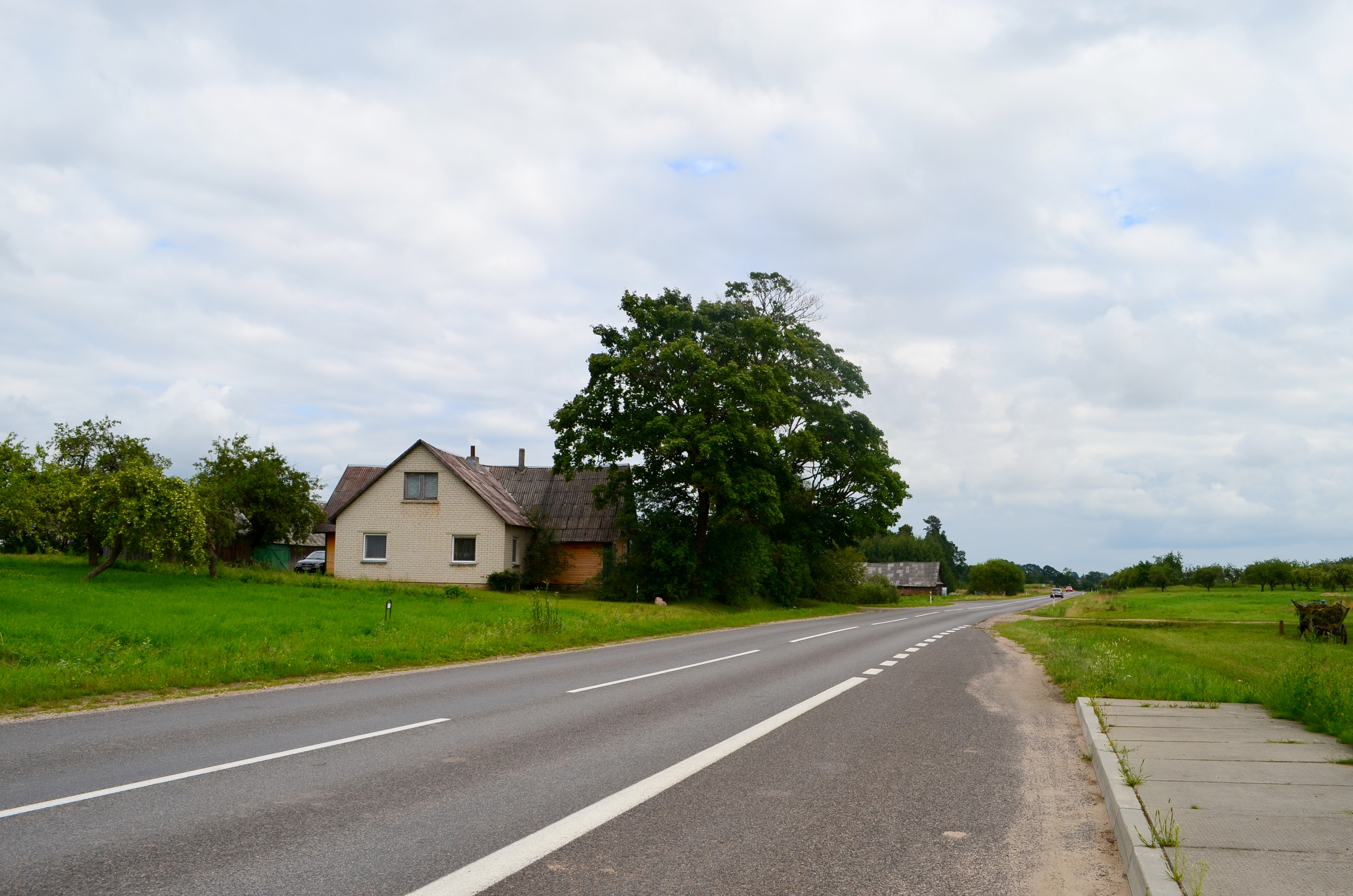 Kūtiškės k., N. Daugėliškio sen., Ignalinos raj.